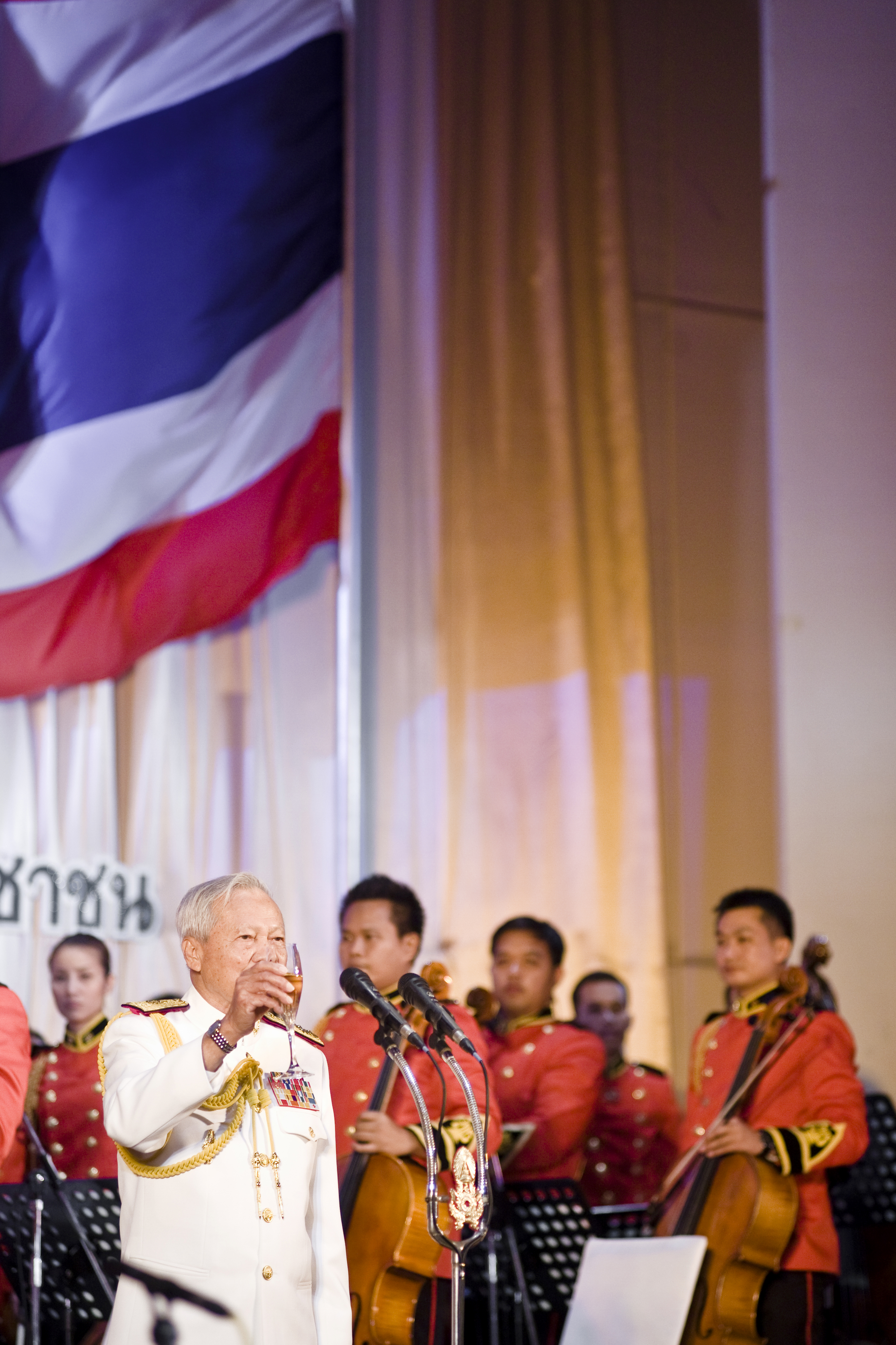 นายกรัฐมนตรี ร่วมงานเลี้ยงรับรองเนื่องในวันกองทัพบก ณ ห้องมัฆวานรังสรรค์ สโมสรทหารบก ถนนวิภาวดีรังสิต กรุงเทพฯ 20 มกราคม 2553 (The Official Site of The Prime Minister of Thailand Photo by พีรพัฒน์ วิมลรังครัตน์)